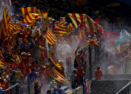 Perpignan Fans. 21 juin 2008 Stade Vélodrome de Marseille ASM Clermont 21 - 7 USA Perpignan demi-finale du top 14 From Flickr